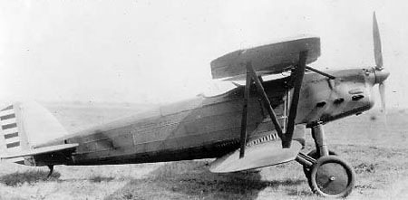 Boeing XP8 fighterh